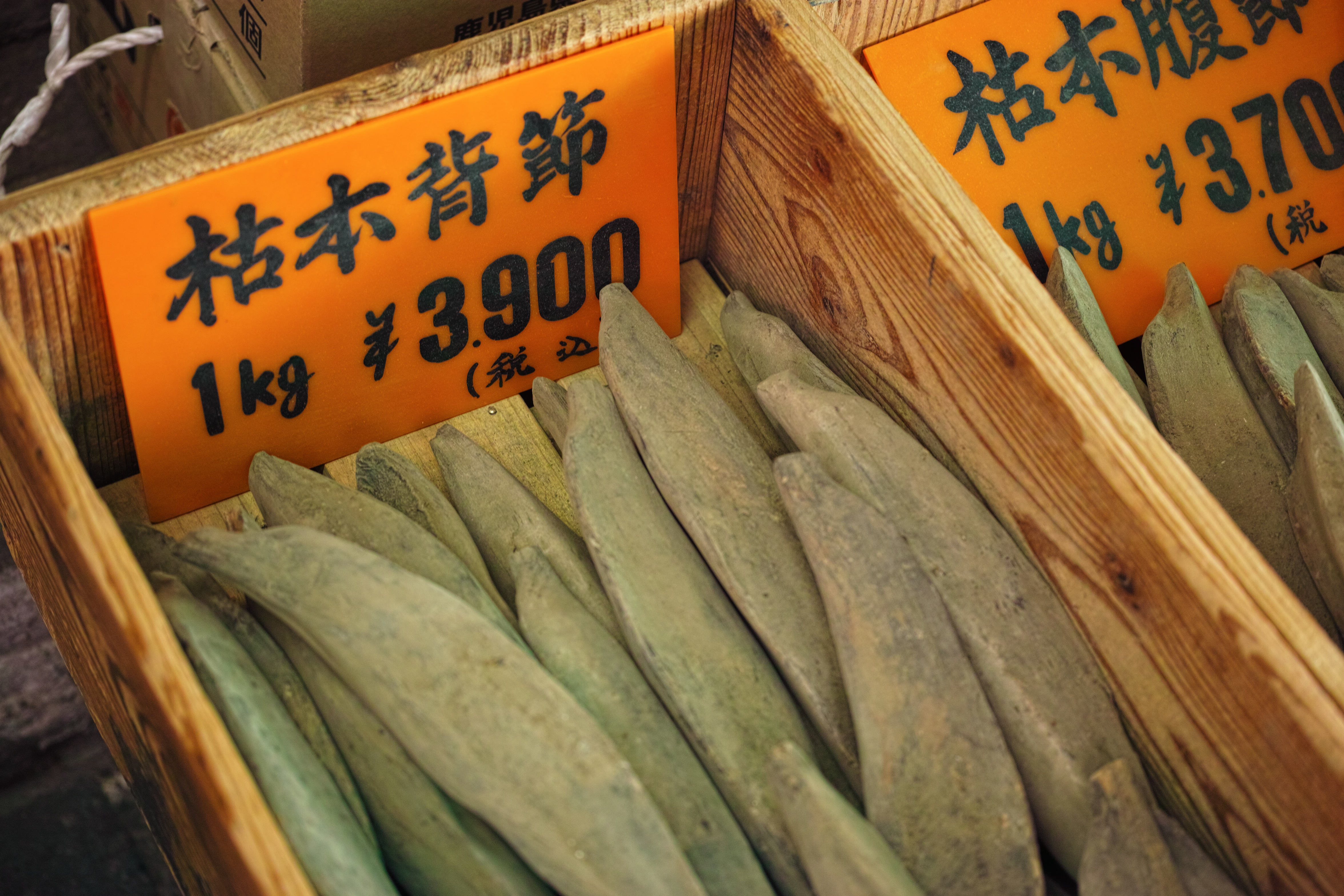 SIGMA DP3 Merrill